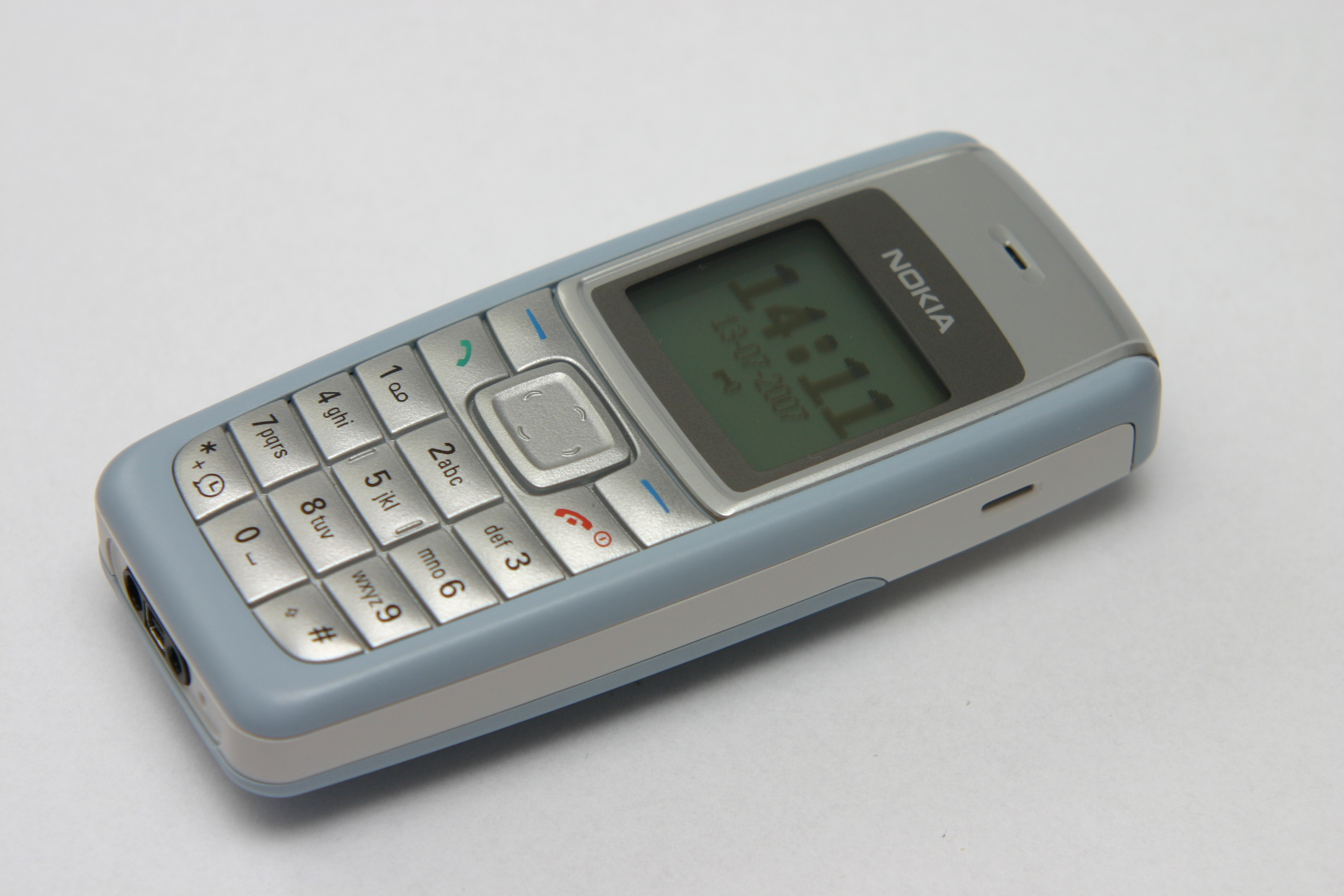 Nokia 1112